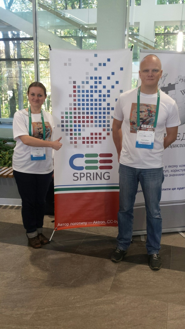 Эрзянская делегация на Wikimedia CEE Meeting во Львове